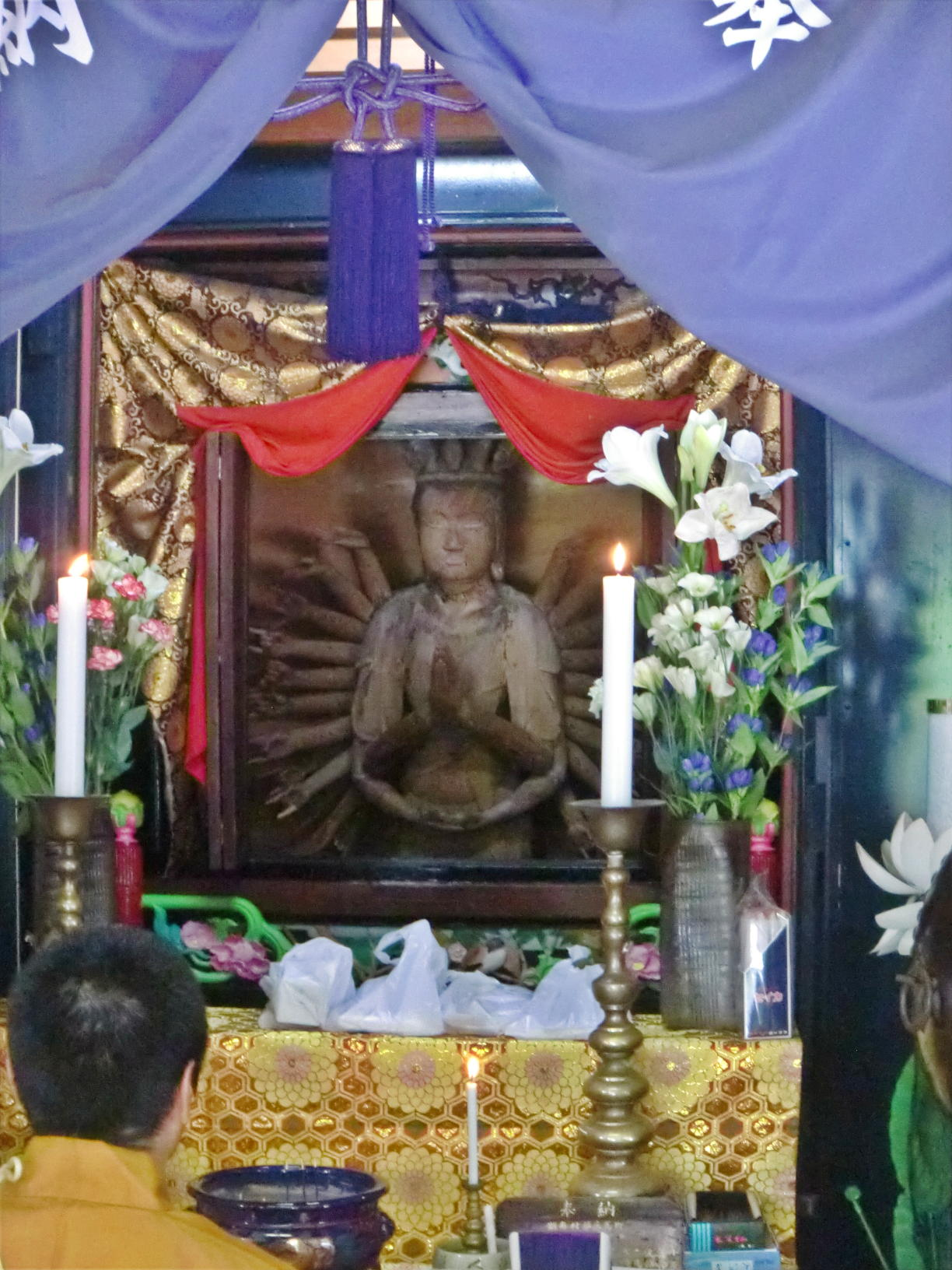 郡山市湖南町の無窮山千手院伏竜寺、木造千手観音立像